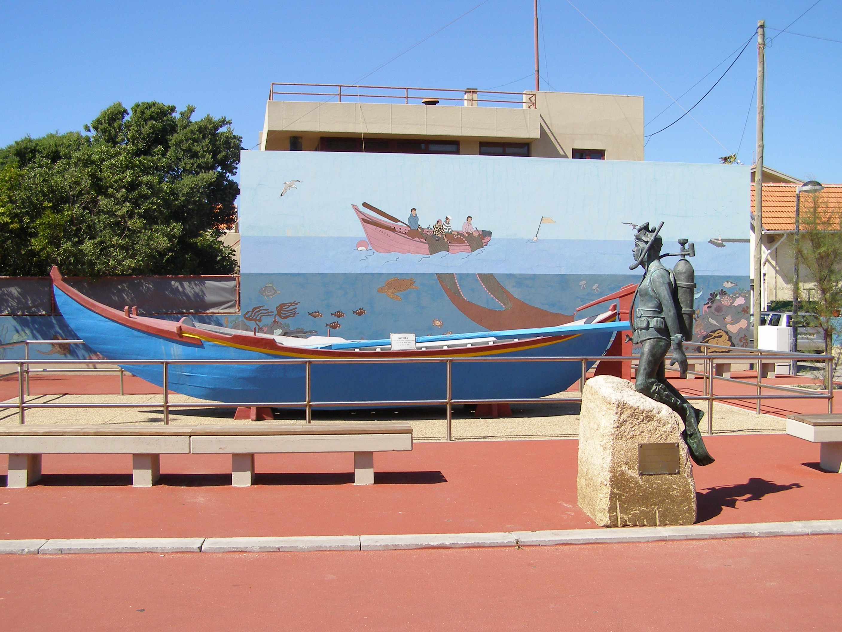 Bateira, mergulhador e mural na Praia da Aguda, em frente à Estação Litoral da Aguda. Freguesia de Arcozelo, Vila Nova de Gaia, Portugal.